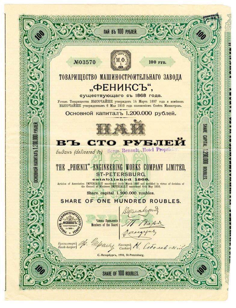 Пай в 100 руб., именной Товарищества машиностроительного завода "Феникс" с основным капиталом в 1,2 млн. руб. С.-Петербург, 1910 г.